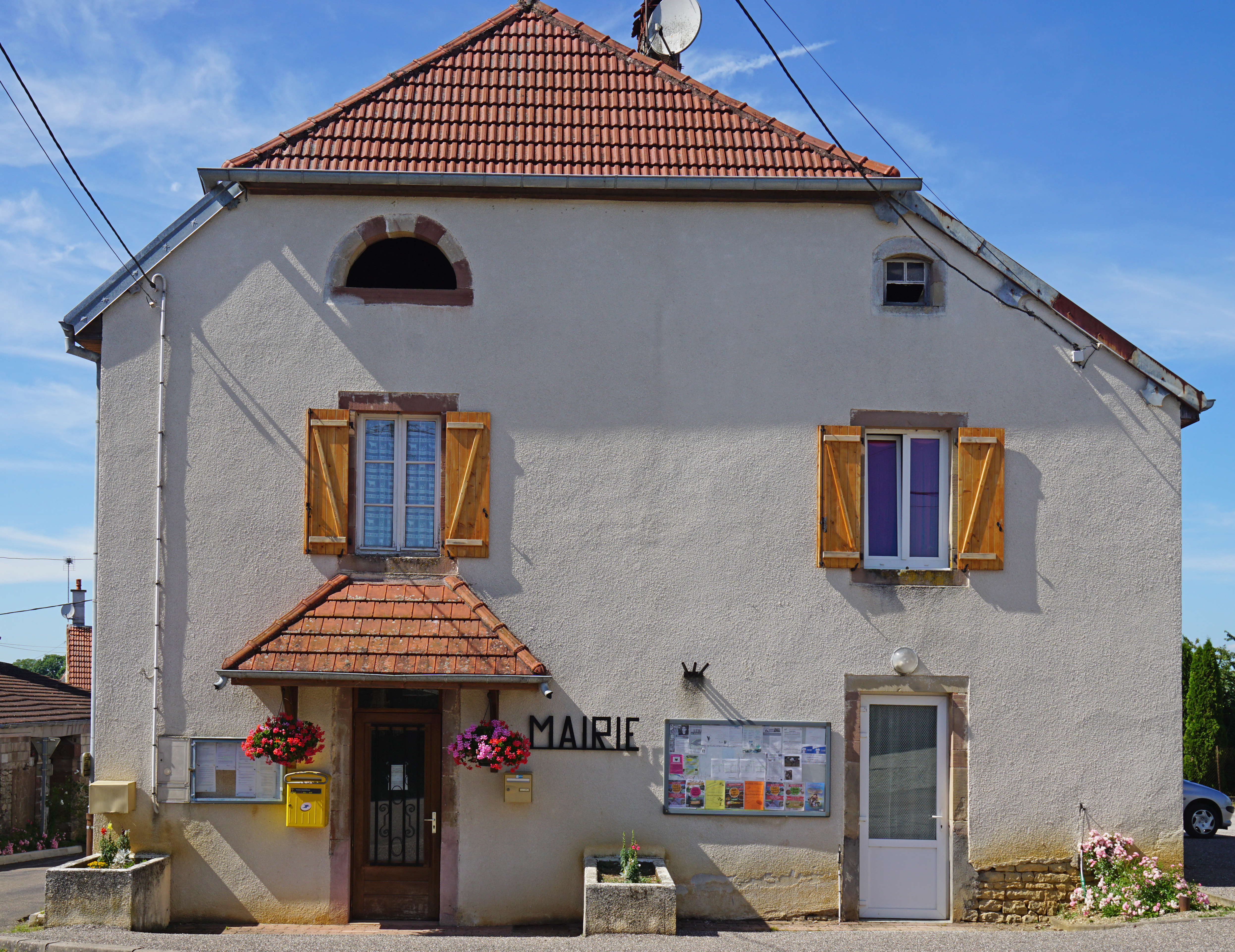 Mairie de Villers-la-Ville (Haute-Saône).